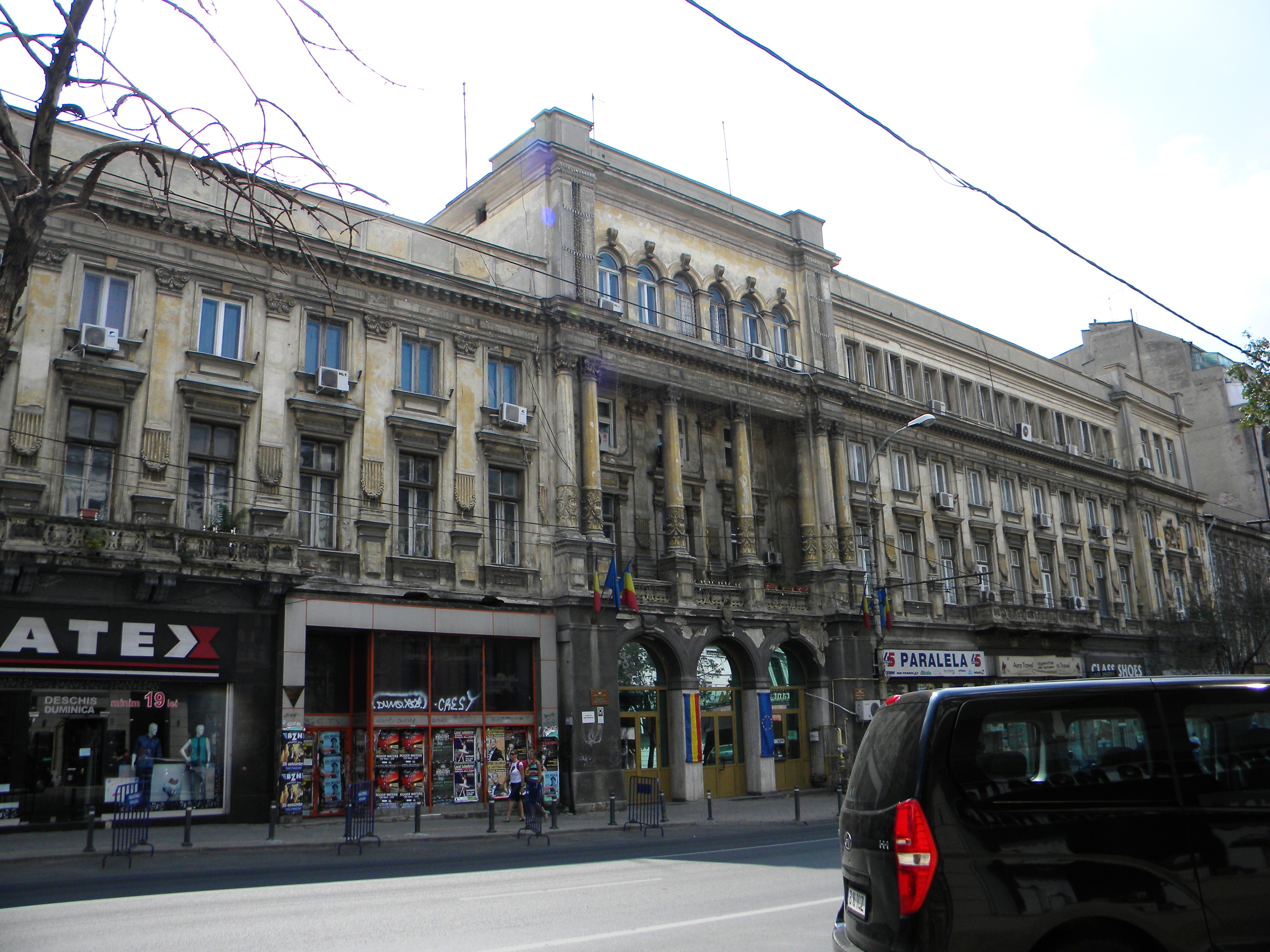 Palatul Fostei Eforii a Spitalelor Civile - Primaria sect. 5.JPG; Bucuresti sect. 5, Bd. Elisabeta nr. 29-31.